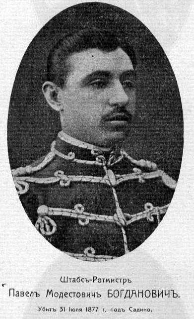 Щабс ротмистър Павел Модестович Богданович от 8-ми Лубенски хусарски полк, убит на 31 юли 1877 г. край село Садина.